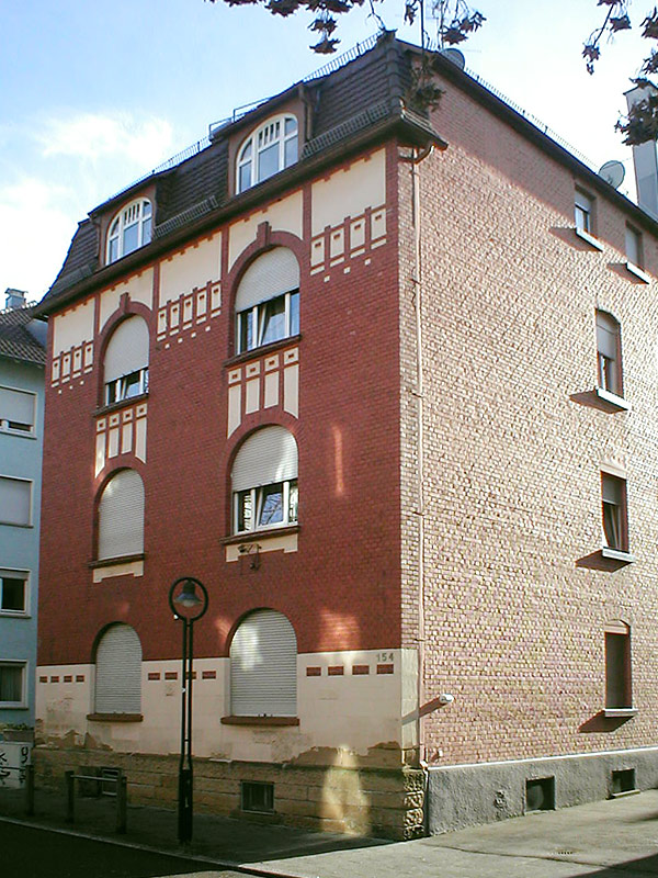 Haus Schöneck, Werderstraße 154 in Heilbronn, denkmalgeschütztes expressionistisches Gebäude von 1906